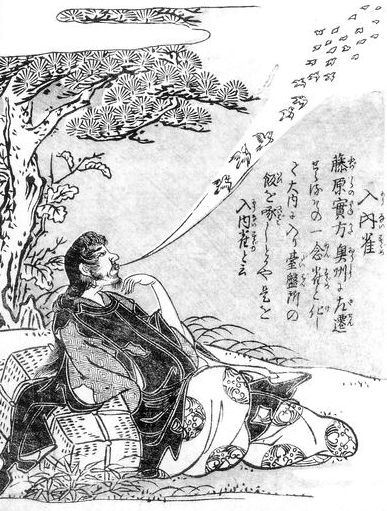 Nyūnaisuzume (入内雀) from the Konjaku Gazu Zoku Hyakki (今昔画図続百鬼)